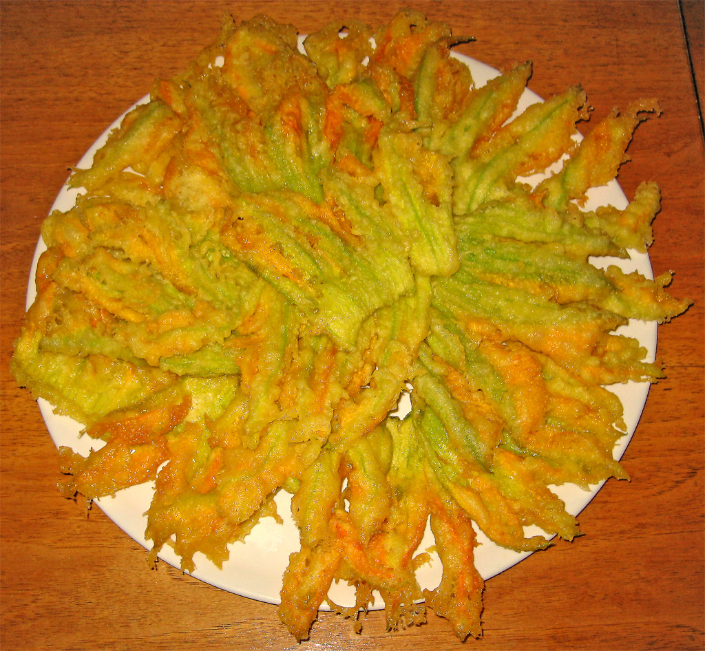 ricetta sul mio Blog